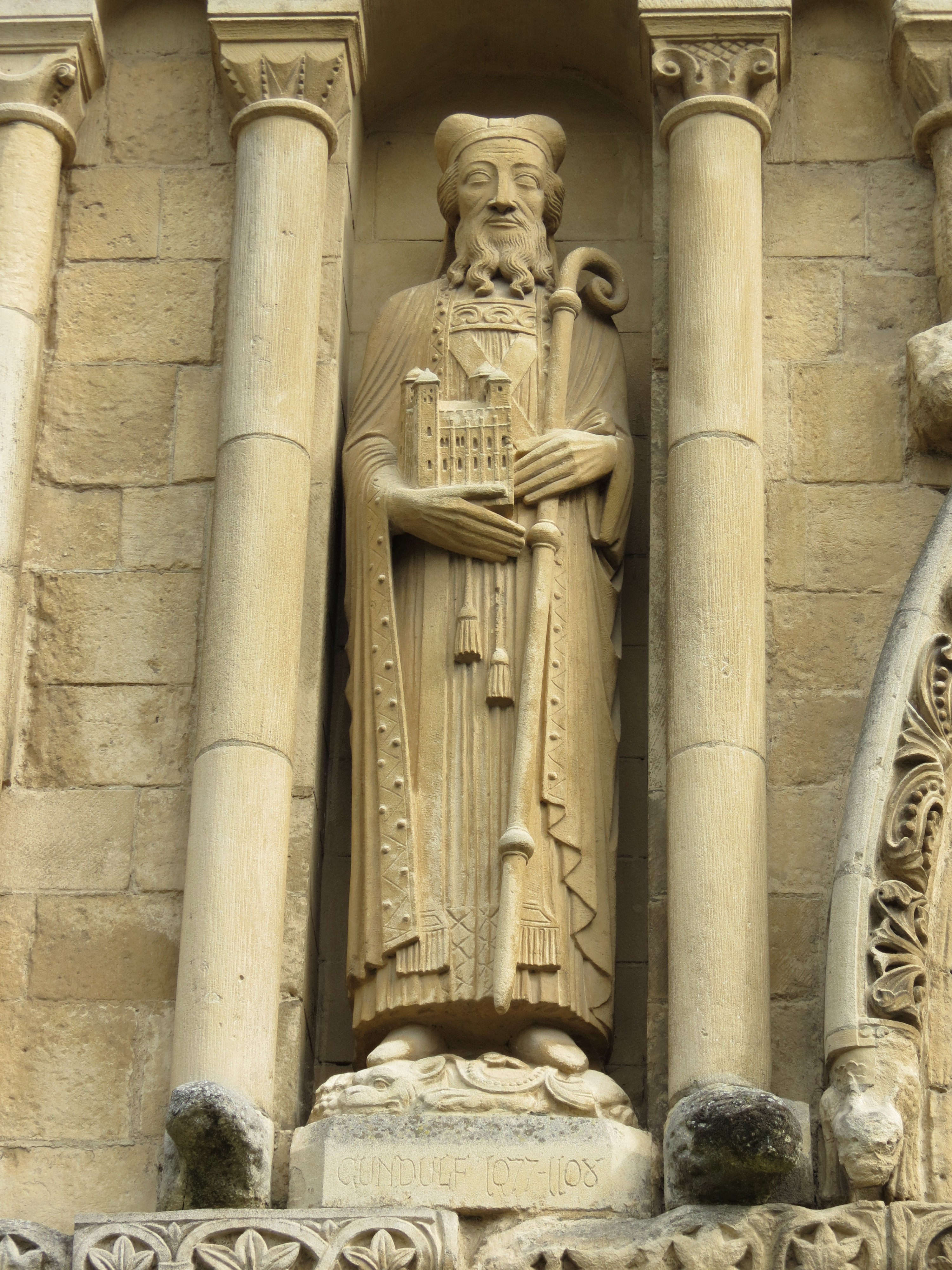 Statue de Gondulf, évêque de Rochester (1077-1108), sur la façade occidentale de la cathédrale de Rochester.